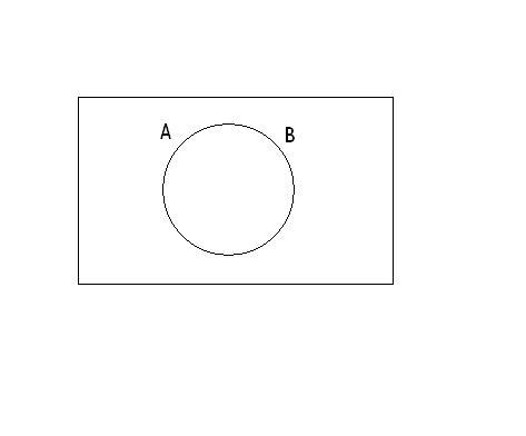 Representación gráfica por diagrama de Venn